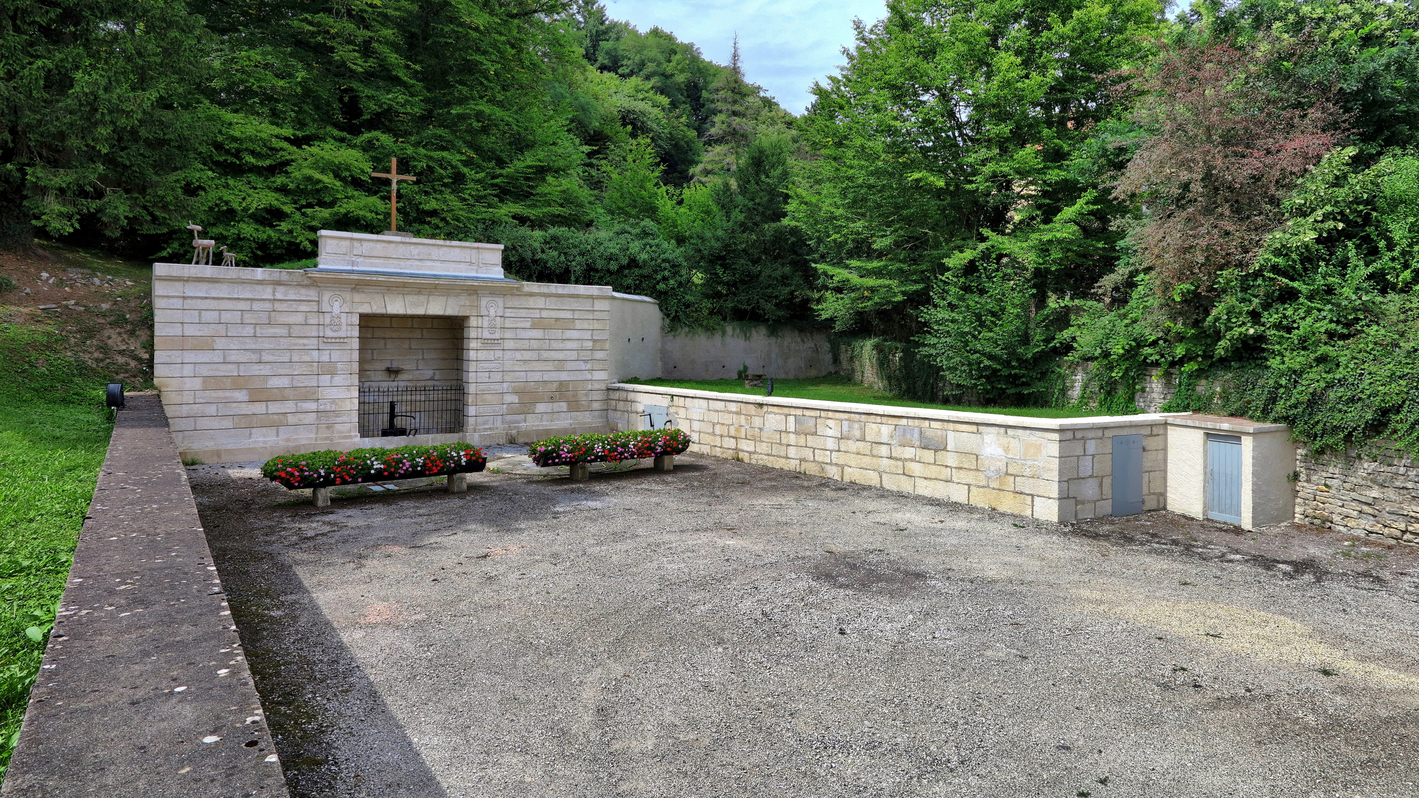 La fontaine